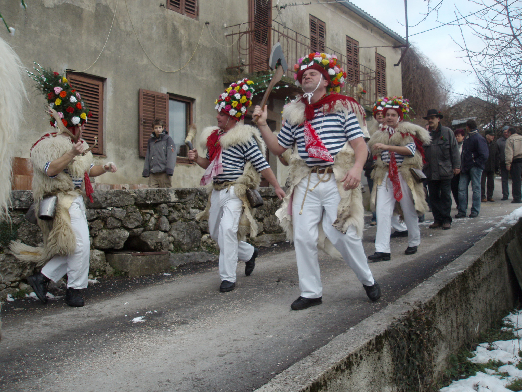 Zvonejski zvončar